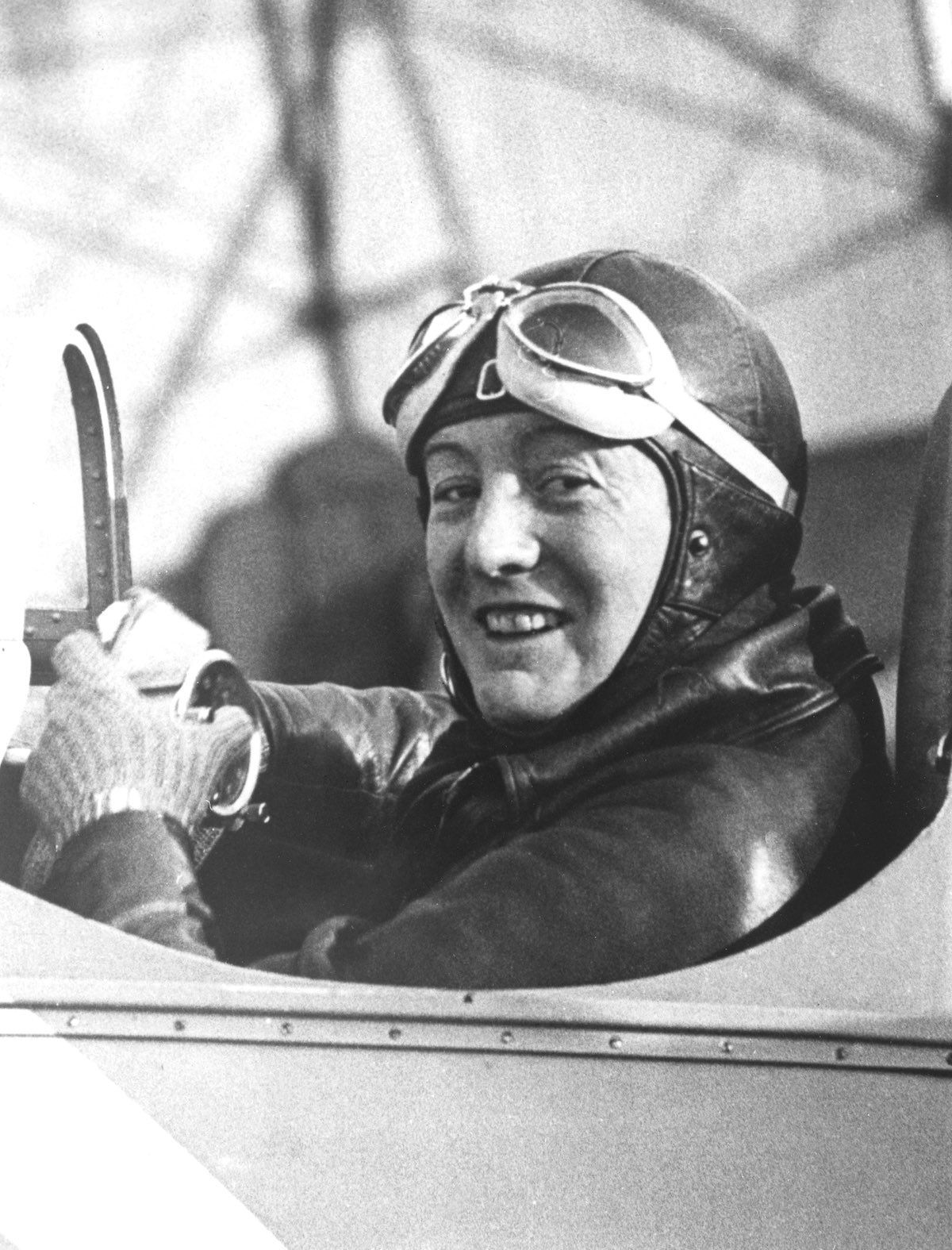 L'aviatrice Élisabeth Lion - Aerodromo du Bourget - 8 aprile 1938